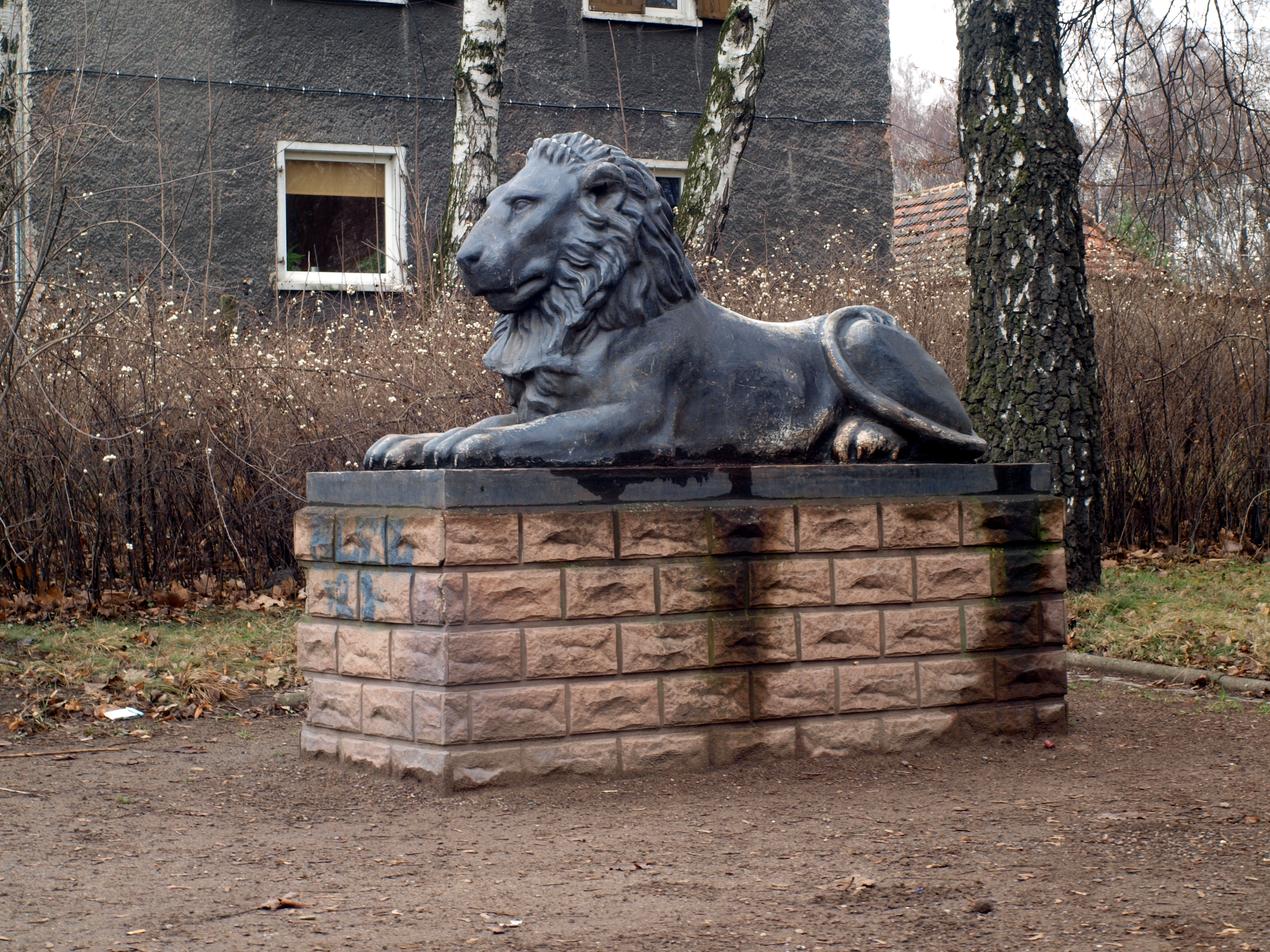 Lew Schadowa. Park im. Pileckiego, Zabrze.